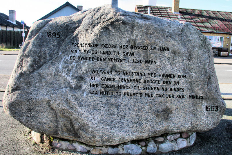 Memorial stone, Strandby havn in Denmark. Photo taken by Jørgen Larsen, 2006-11-12.